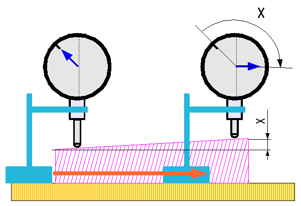 Principe de mesure d'un défaut de rectitude dans un plan.